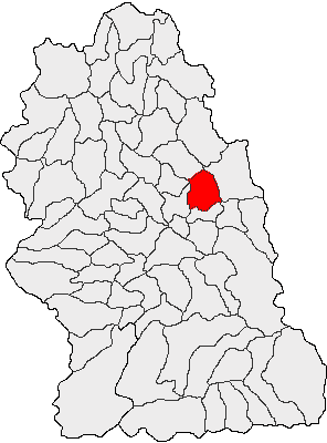 Categorie:Hărţi ale judeţului Hunedoara